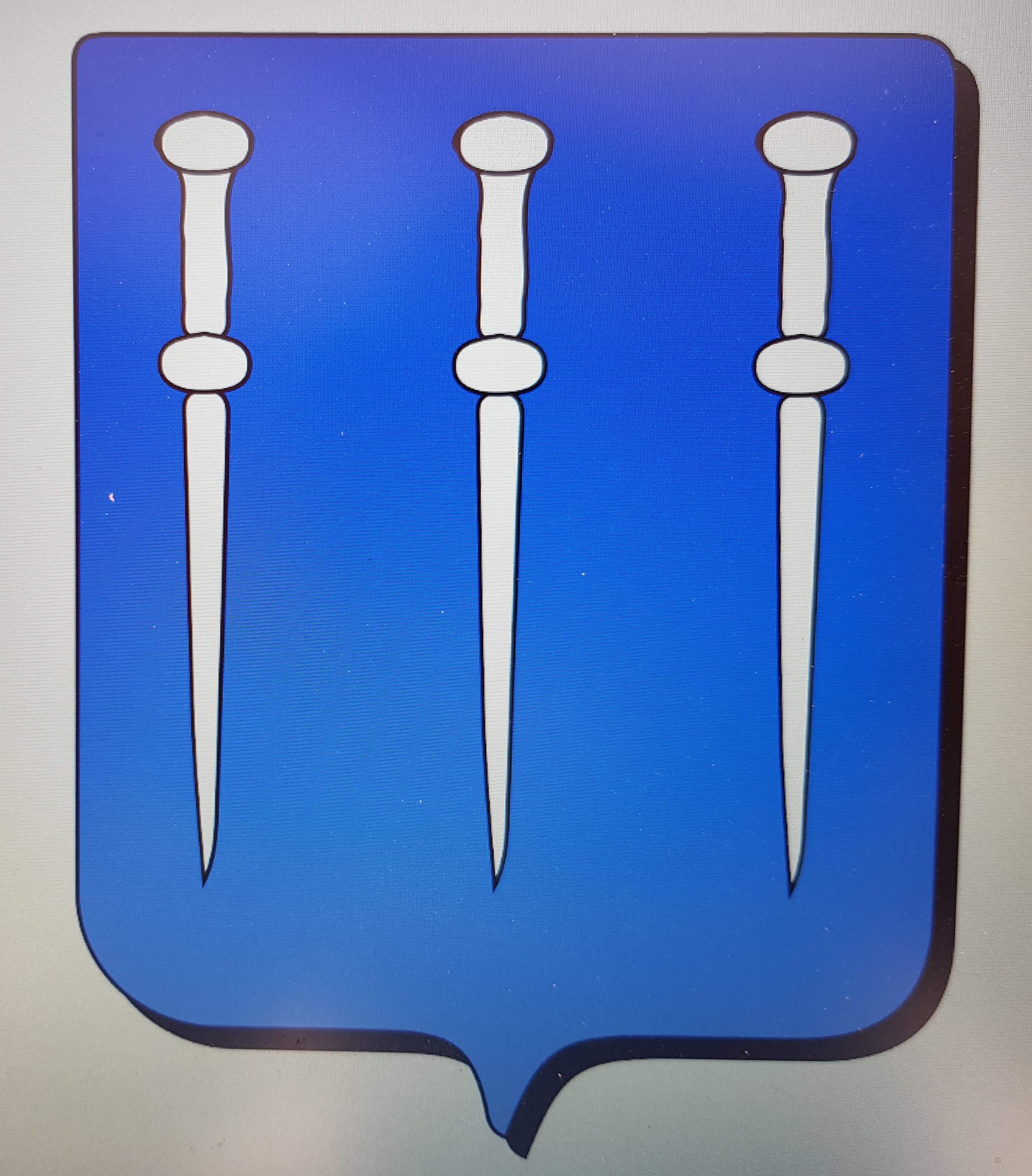 Armorial famille de Maurey